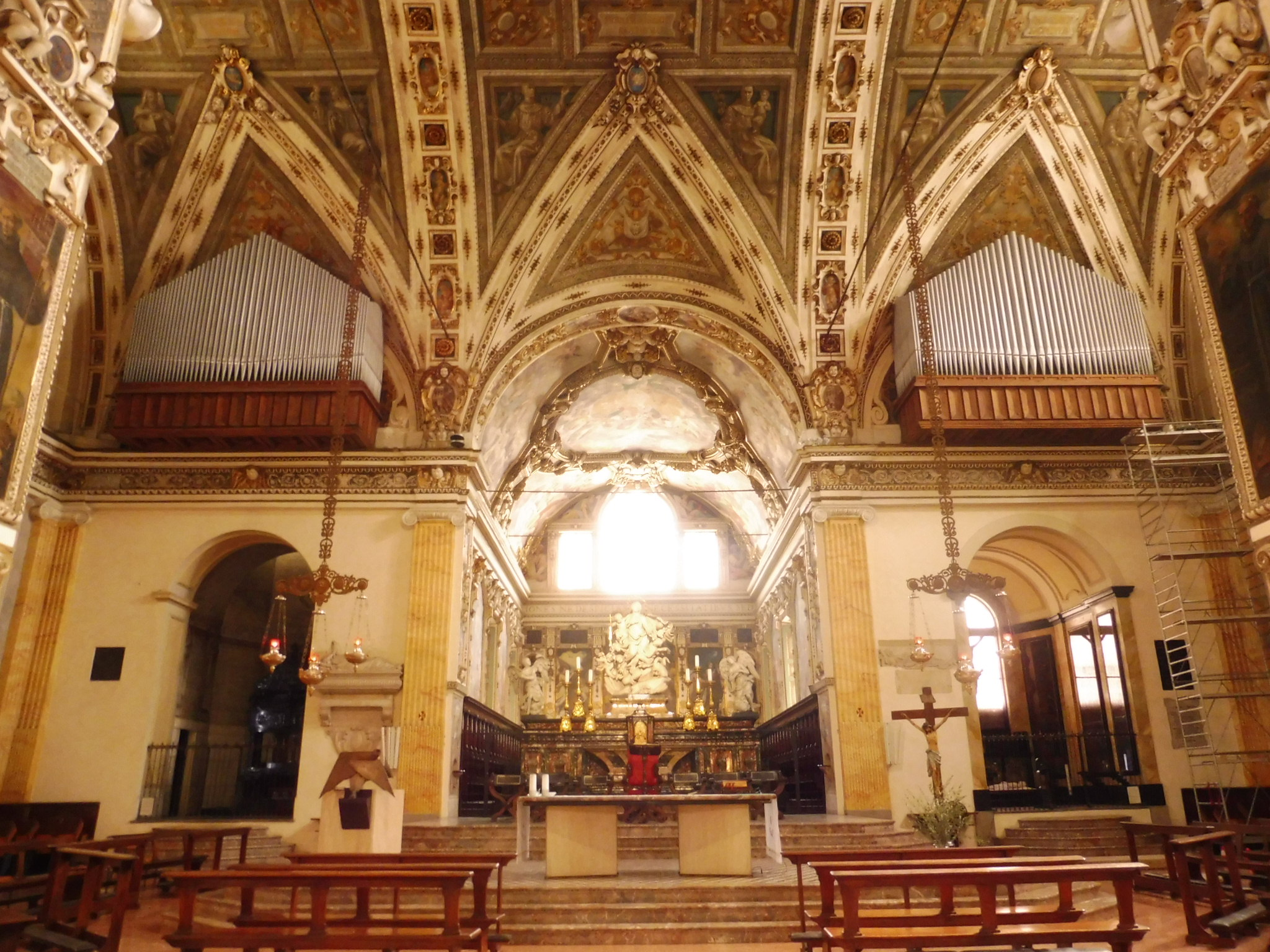 Milano, Sant'Angelo, altar maggiore e organi